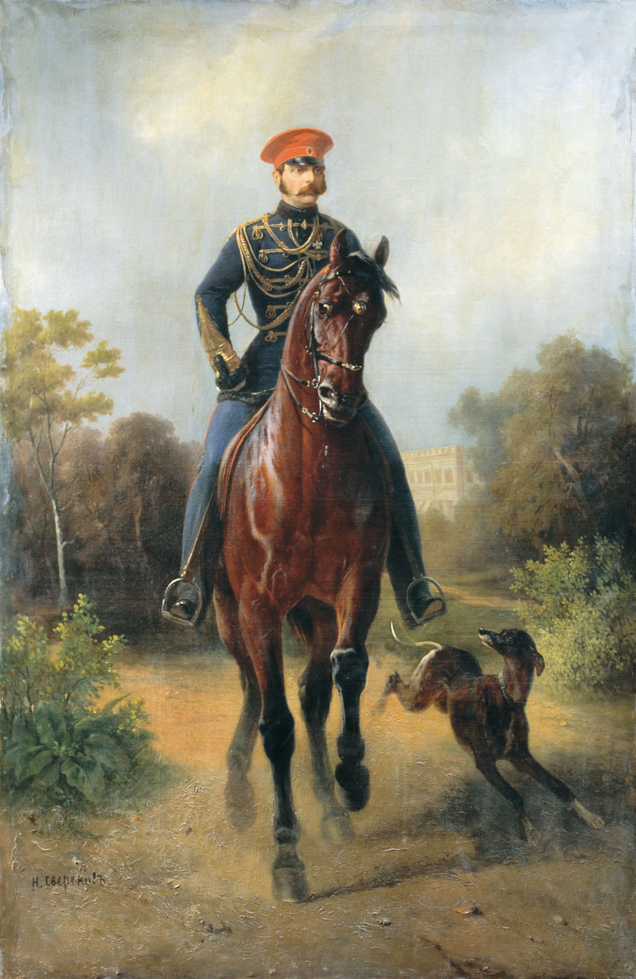 Alexander II of Russia Портрет императора Александра II Холст, масло. 213 x 140 см Московский музей-усадьба Останкино